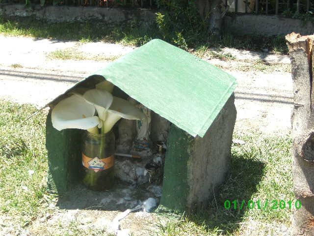 Animita ubicada en J.Kennedy 60 esq. Vicuña Mackenna p.22, La Florida, Chile, dedicada a joven muerto por patrulla militar pinochetista en jornada de protesta.